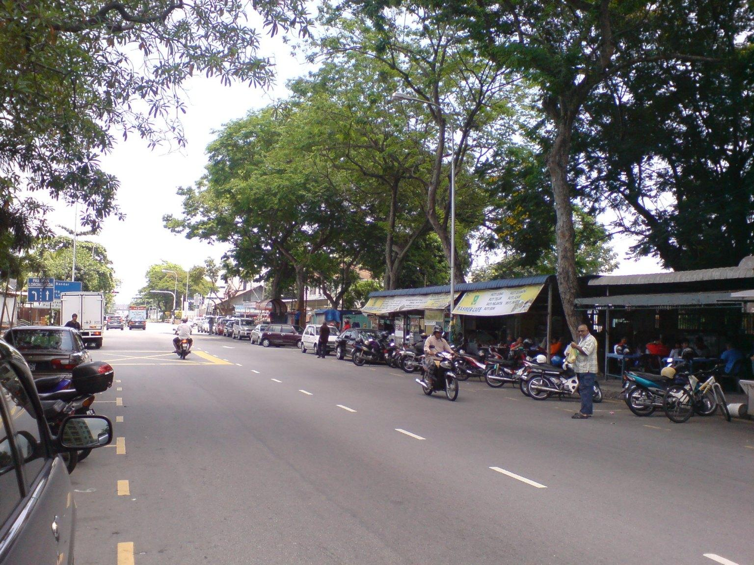 Main Road Sungai Pinang 2